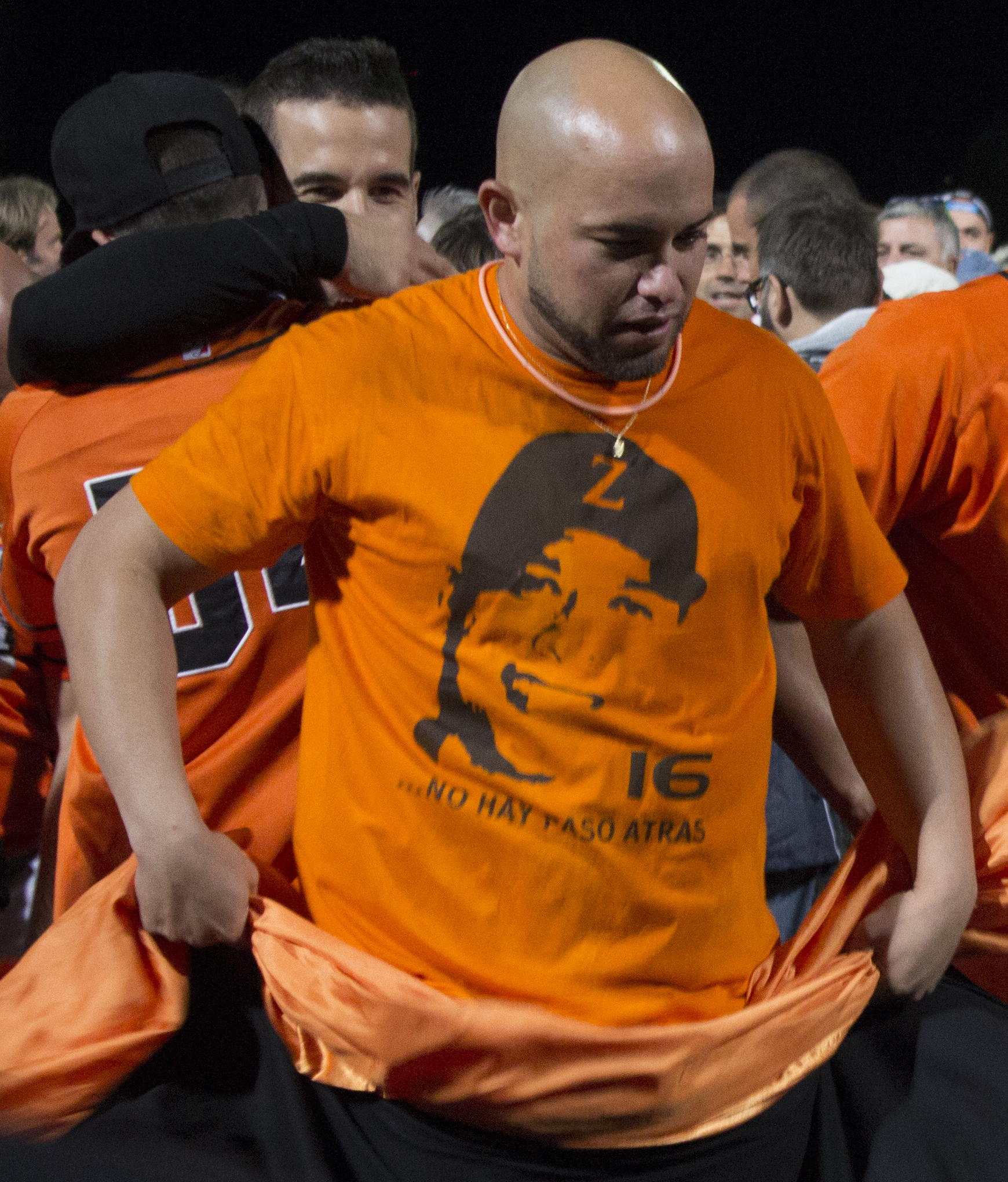 Il lanciatore del Rimini Baseball, José Escalona, dopo la conquista dello scudetto 2015.